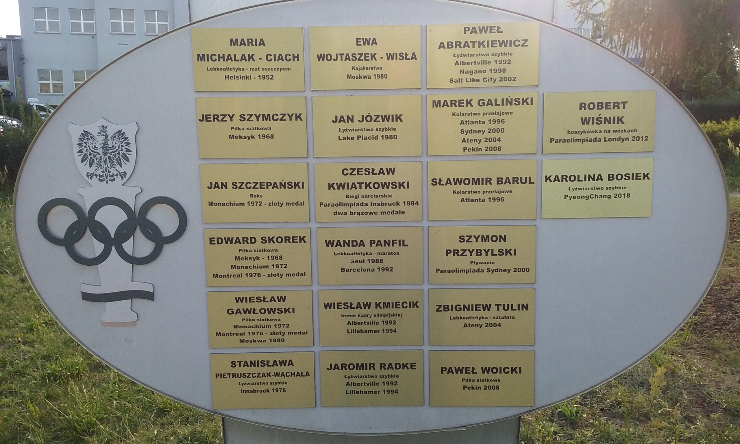 Lista tomaszowskich sportowców uczestników olimpiad. Tablica pamiątkowa na rondzie Tomaszowskich Olimpijczyków w Tomaszowie Mazowieckim, sierpień 2018 roku